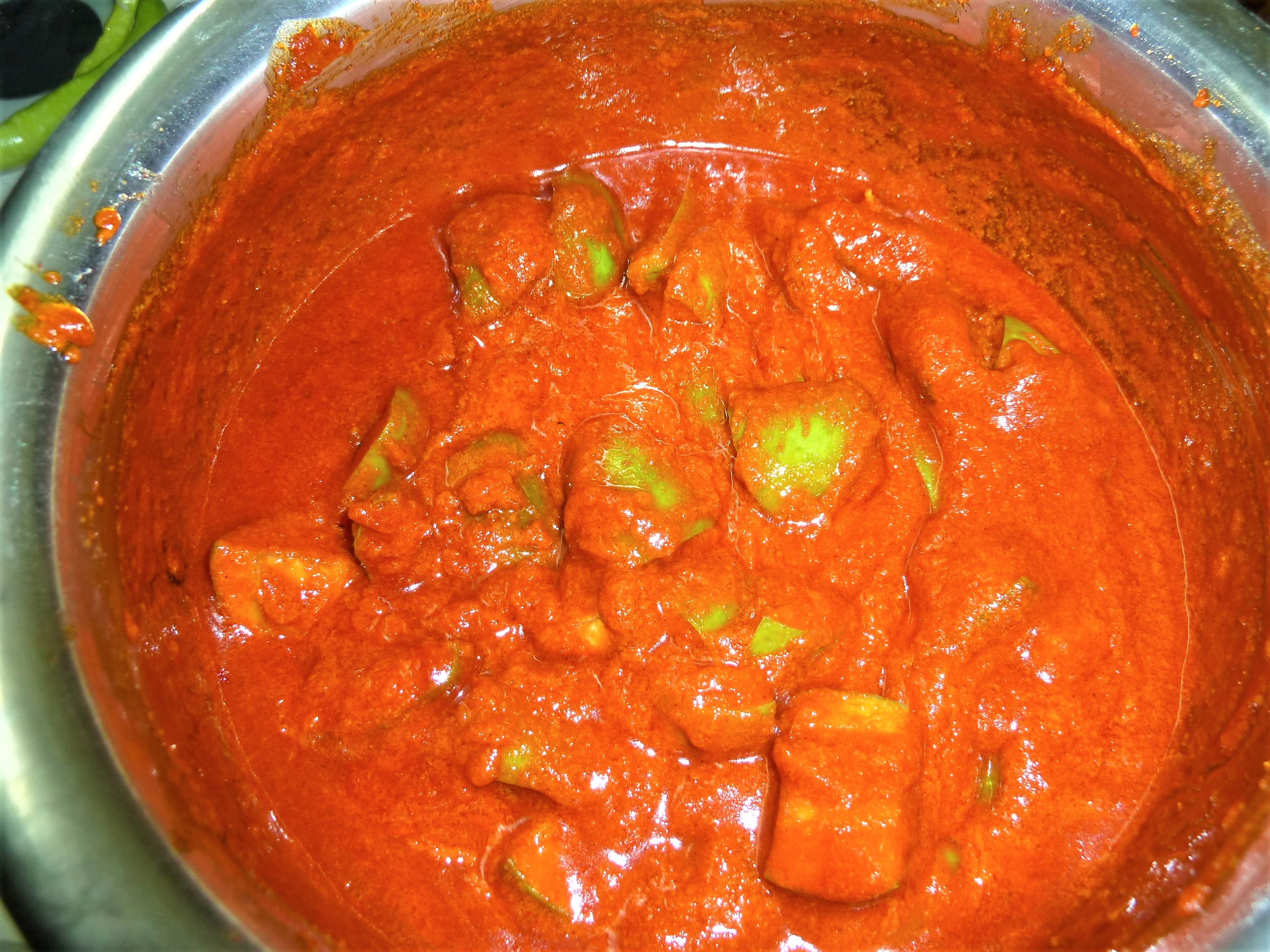 పెసర ఆవకాయ